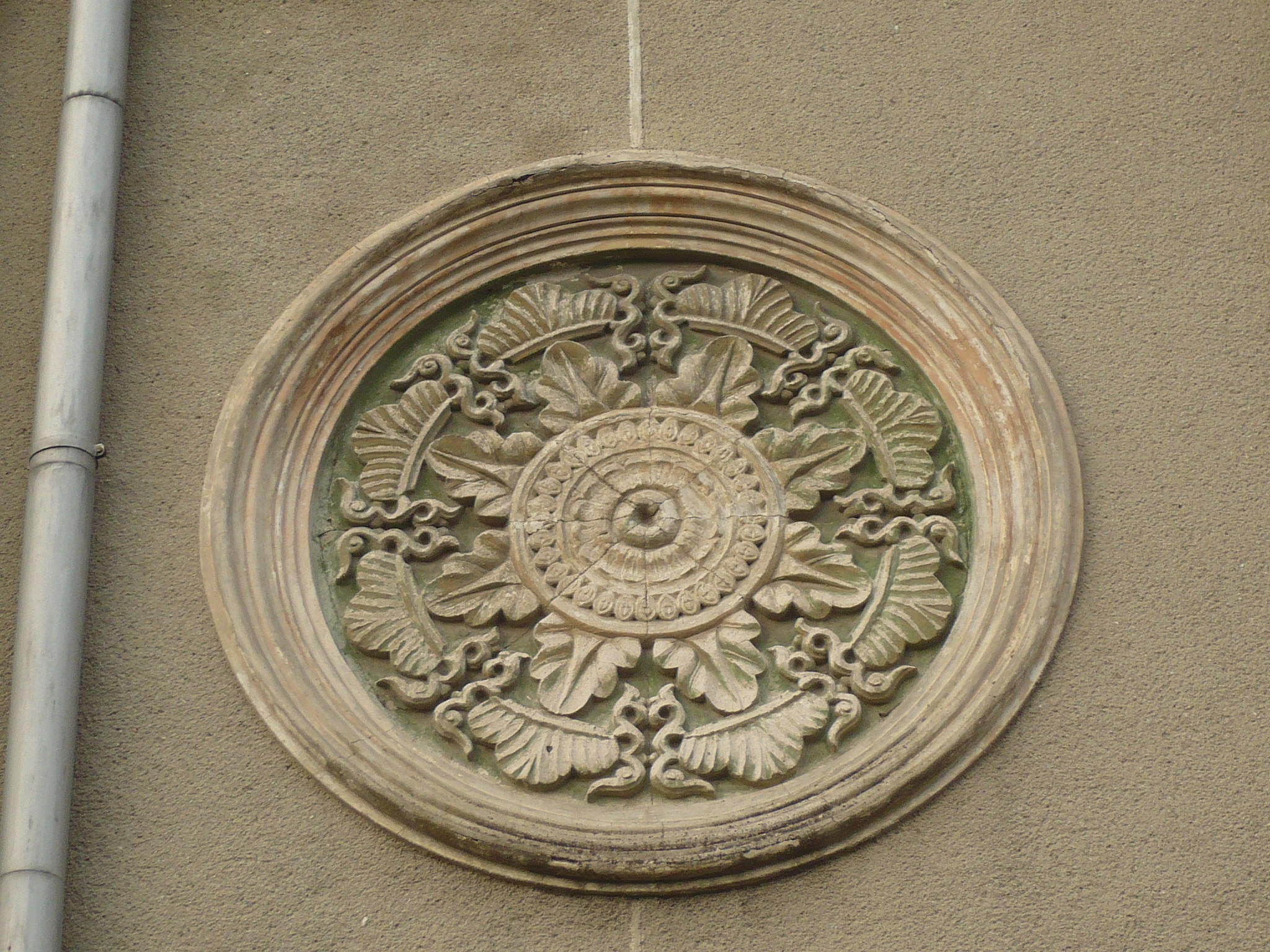 Czortków. Synagoga